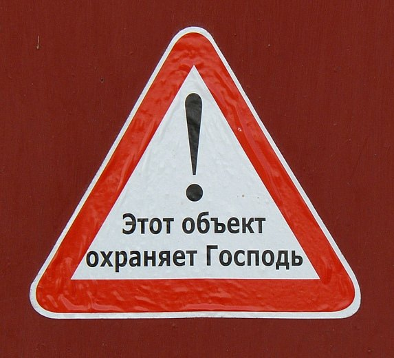 Знак "Этот объект охраняет господь". Фото путешествия по Беларуси.